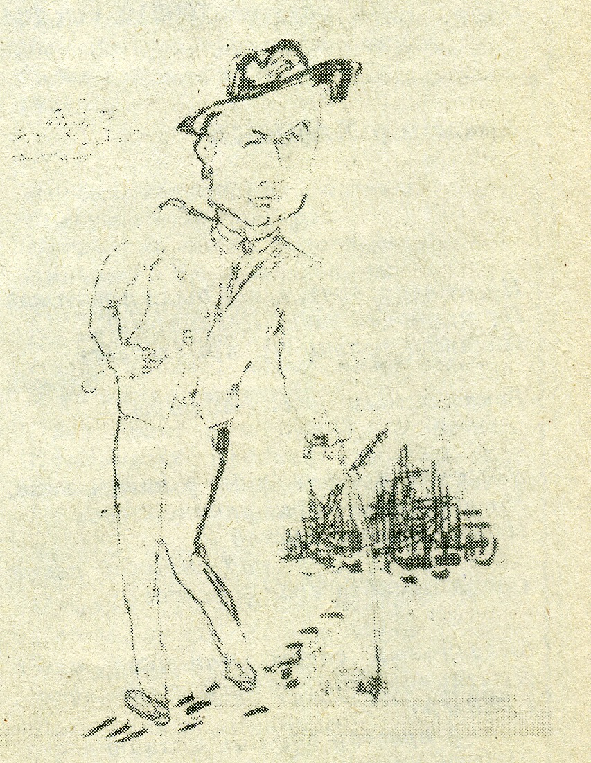 Беларуская (тарашкевіца): Сяброўскі шарж на беларускага перакладчыка і паэта Уладзімера Хадыку